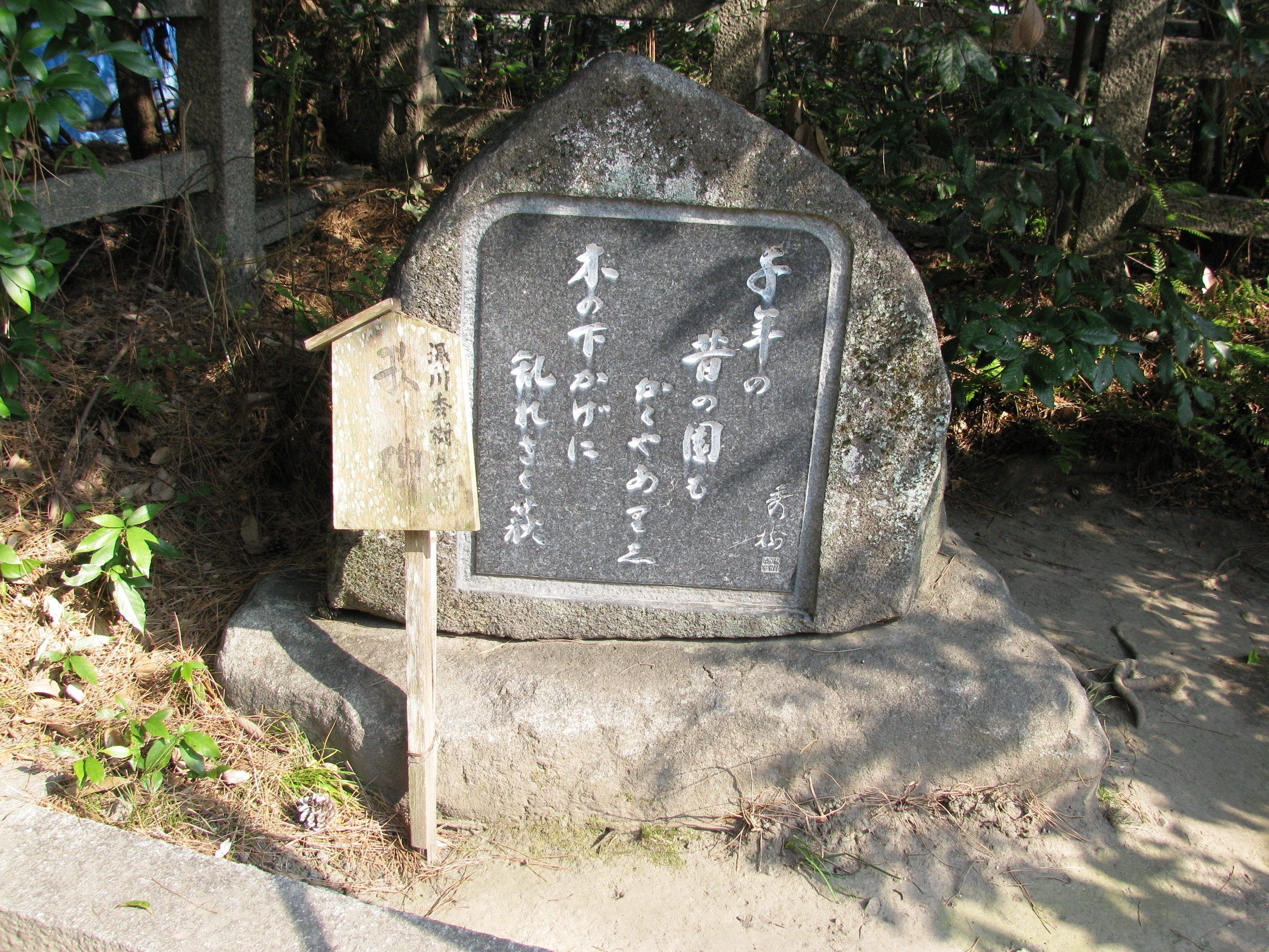 梨木神社に置かれている湯川秀樹の歌碑